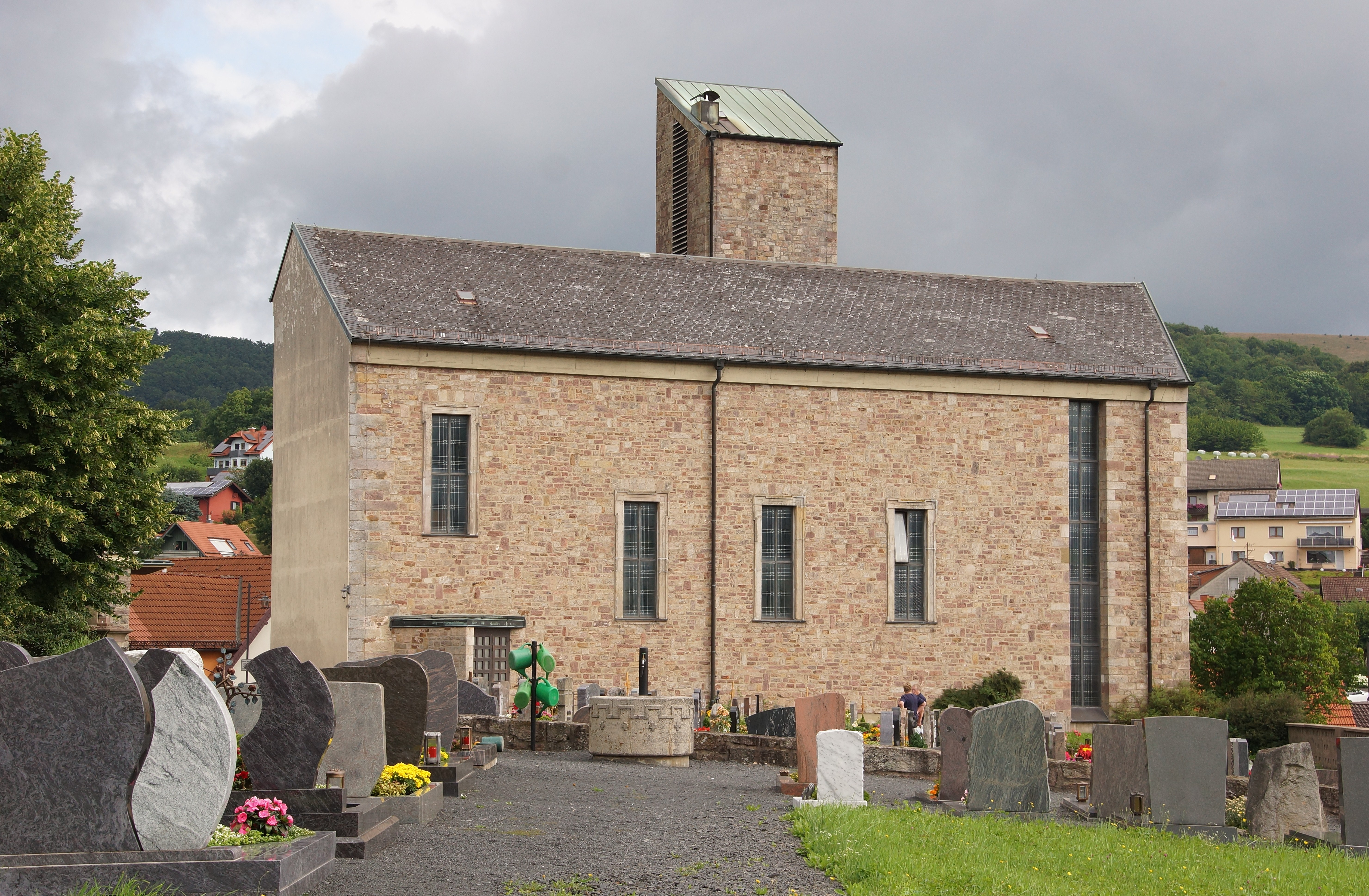 Katholische Kuratiekirche Sankt Vitus und Sankt Antonius in Oberweißenbrunn